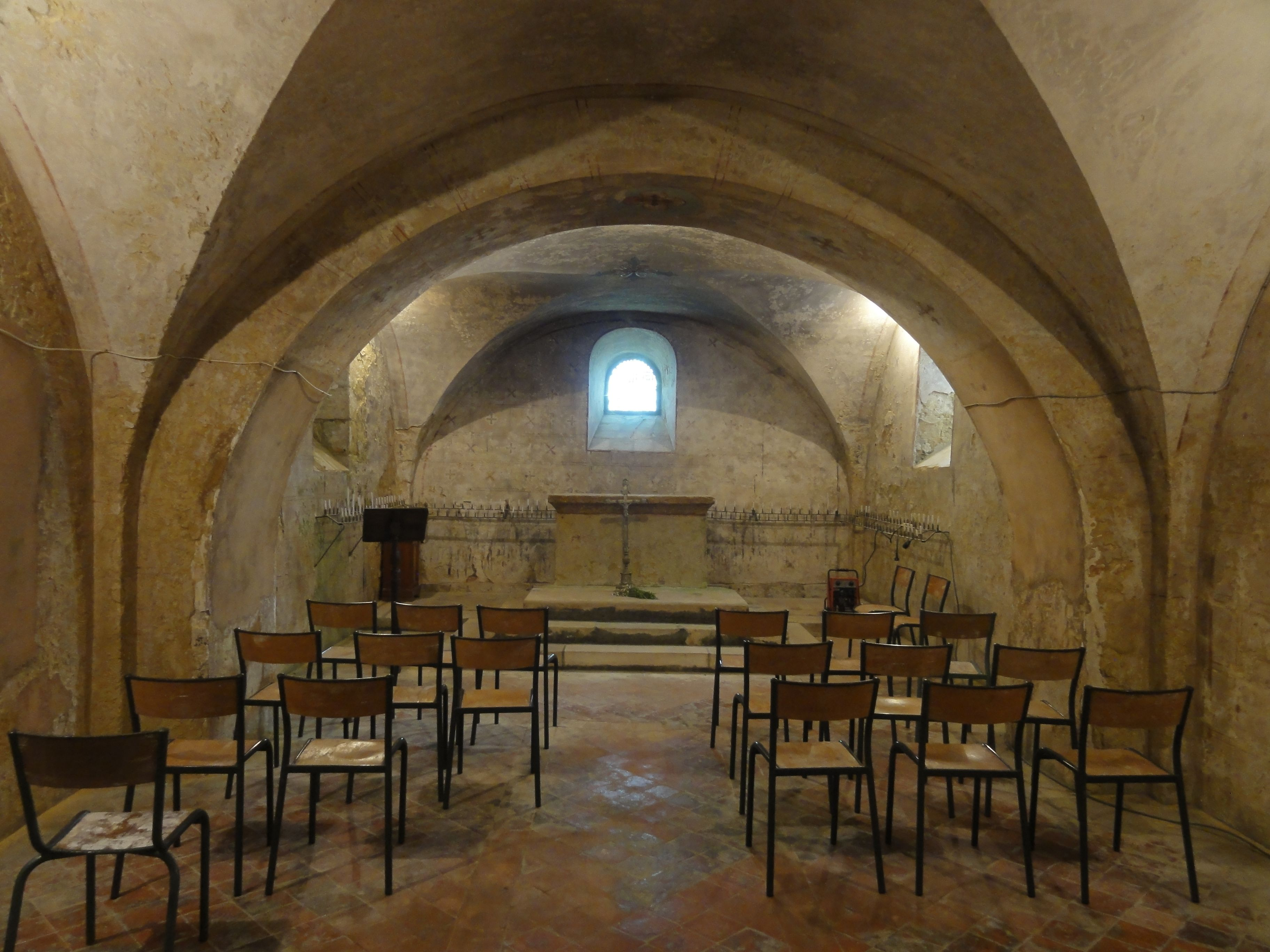 Voir titre du fichier.